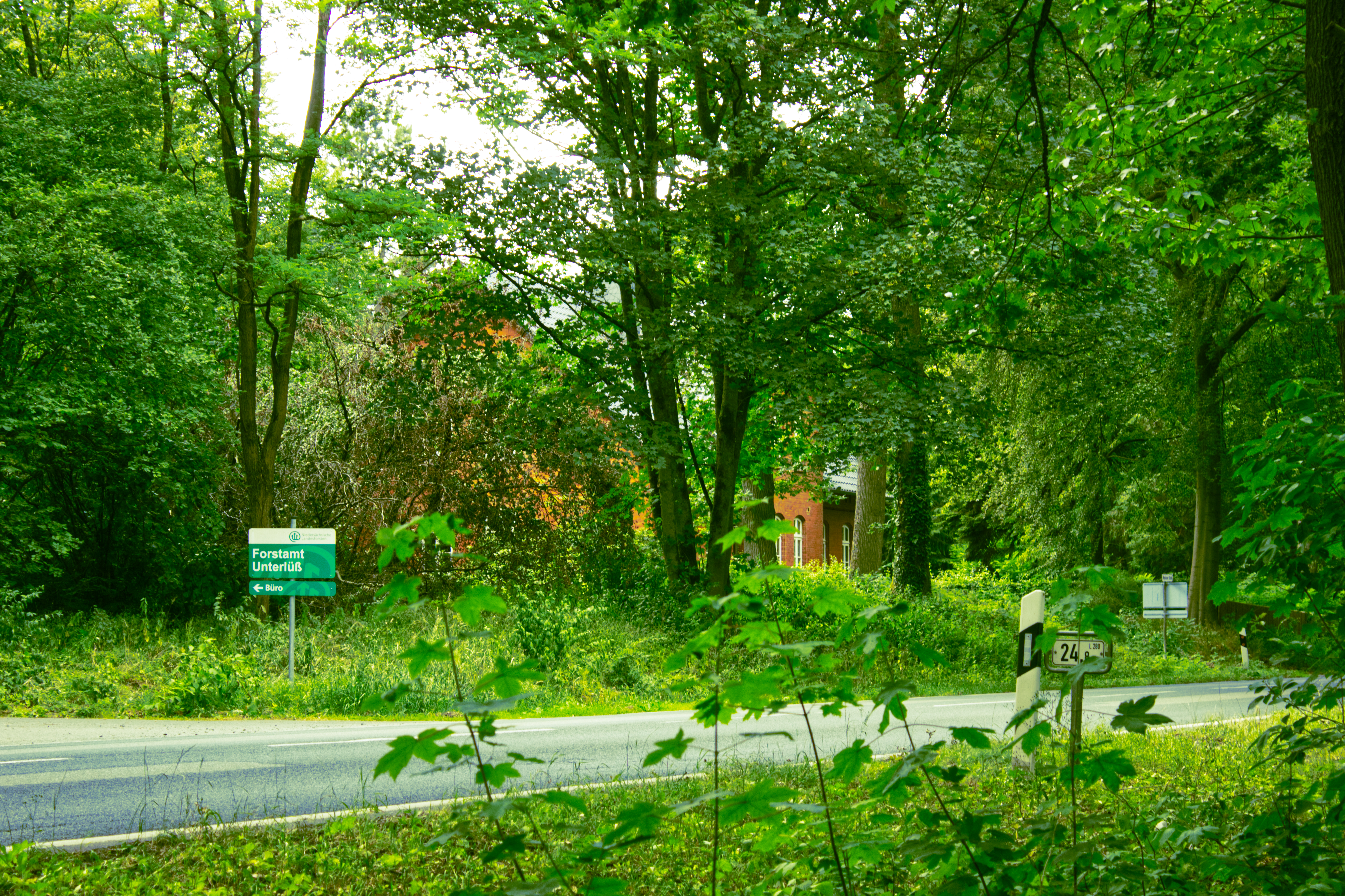 Das Forstamt in Unterlüß mitten im Grünen